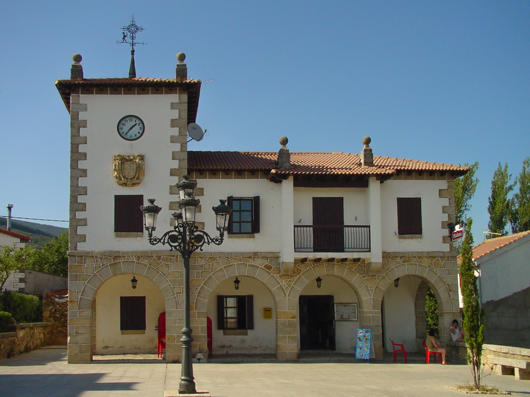 Ayuntamiento de Navarredonda y San Mamés.